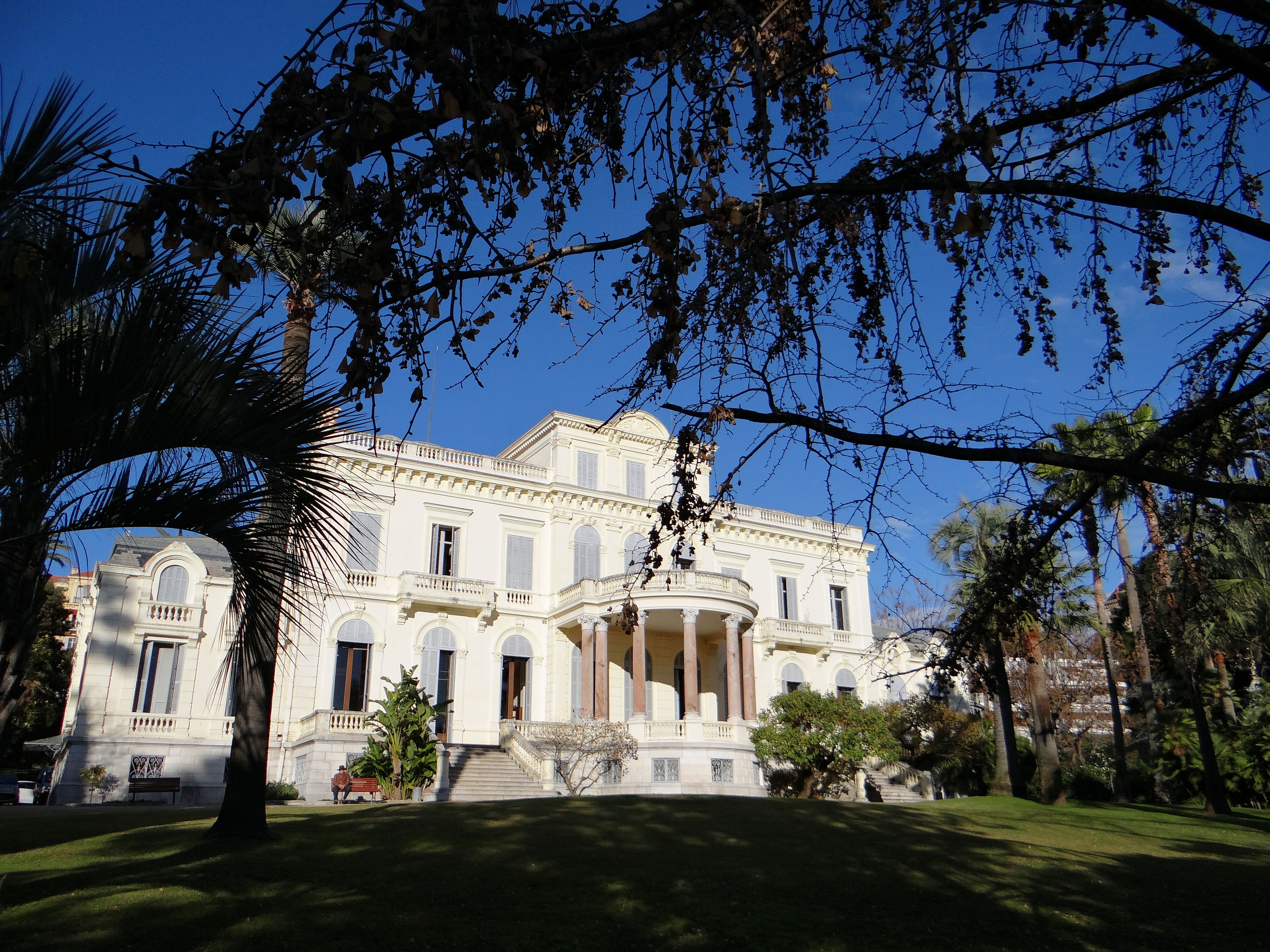 Cannes - Villa Rothschild - La villa dans son parc